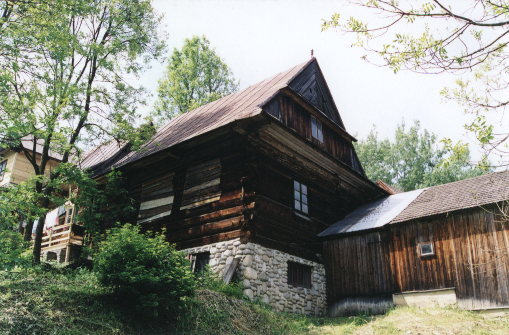 Dom Piotra Kułacha w osiedlu Hodówka w Bańskiej